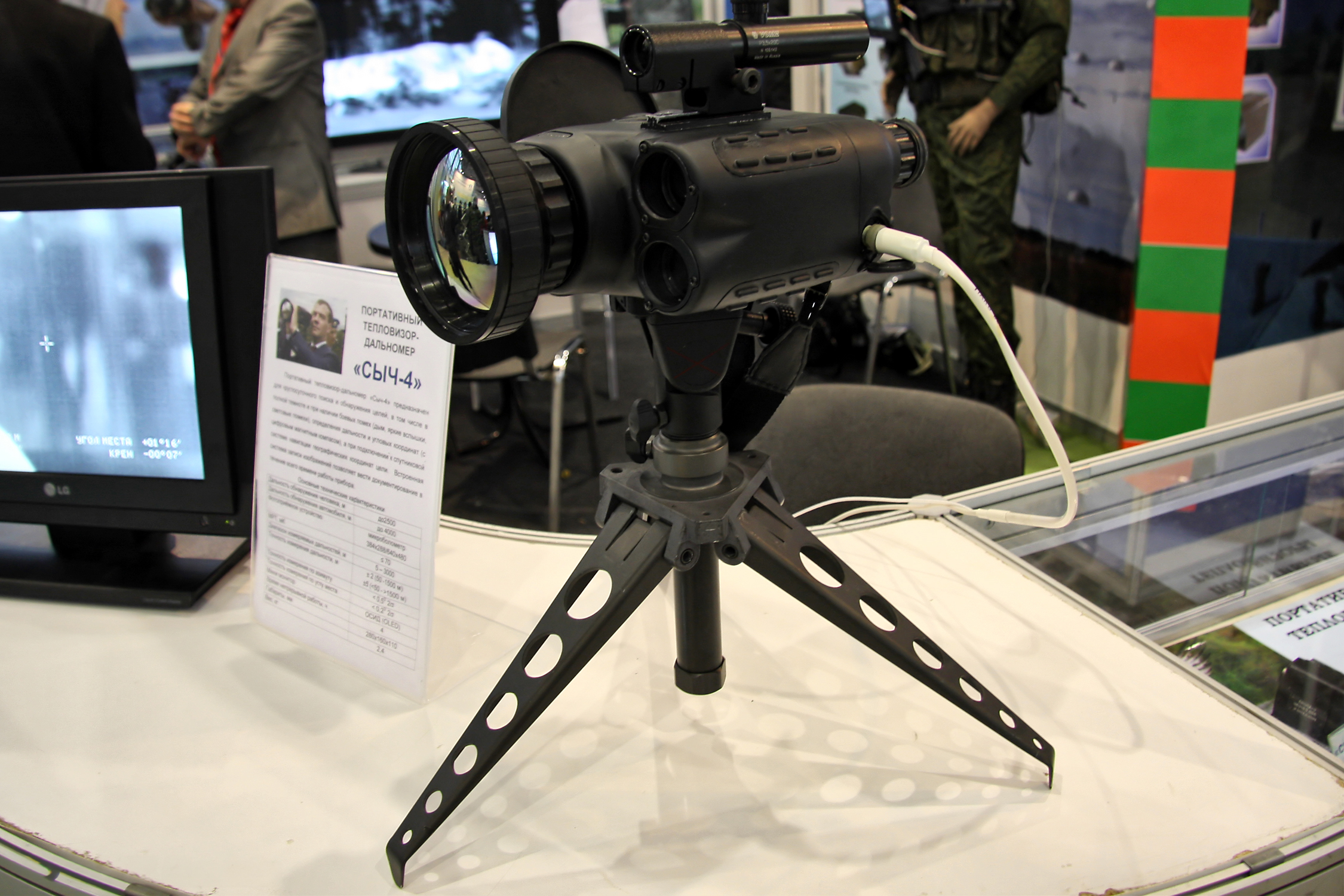 Портативный тепловизор-дальномер Сыч-4 (Portable thermal imager-range finder Sich-4)